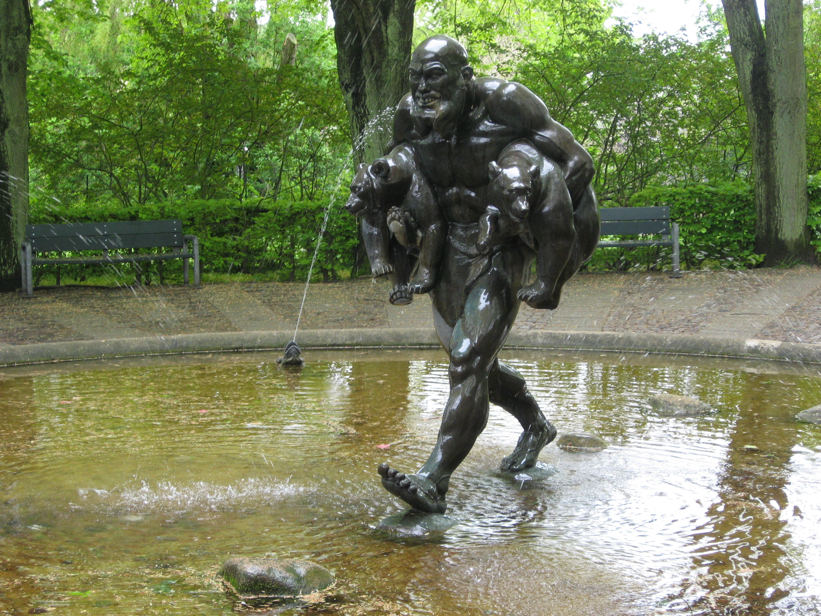 Sculpture in Aalborg Zoo, Ålborg, Denmark. Det gode kup by C.J. Bonnesen, 1925.